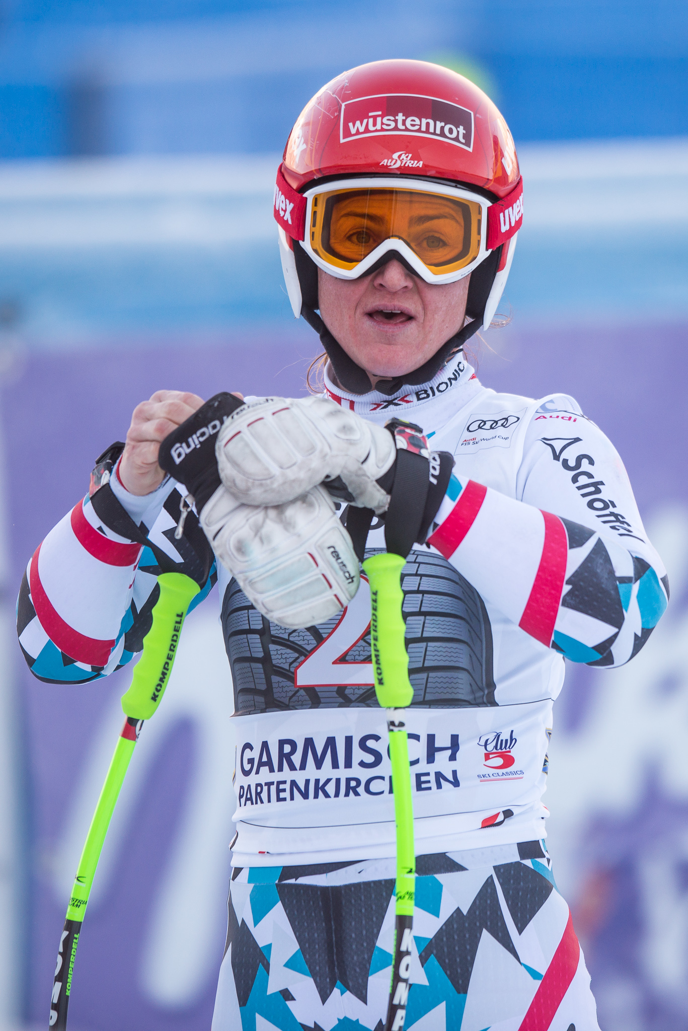 64. Kandahar Rennen,Audi FIS Ski Weltcup Garmisch-Partenkirchen,Damen Abfahrt,Elisabeth Görgl,Kandahar,Ladies Downhill